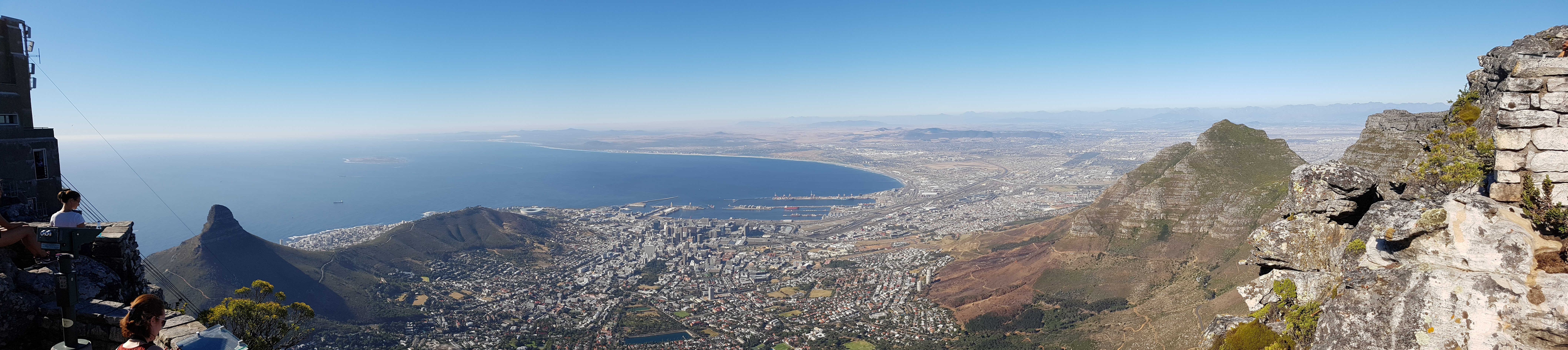 Utsikt fra Table Mountain - bilde av Christer Gundersen